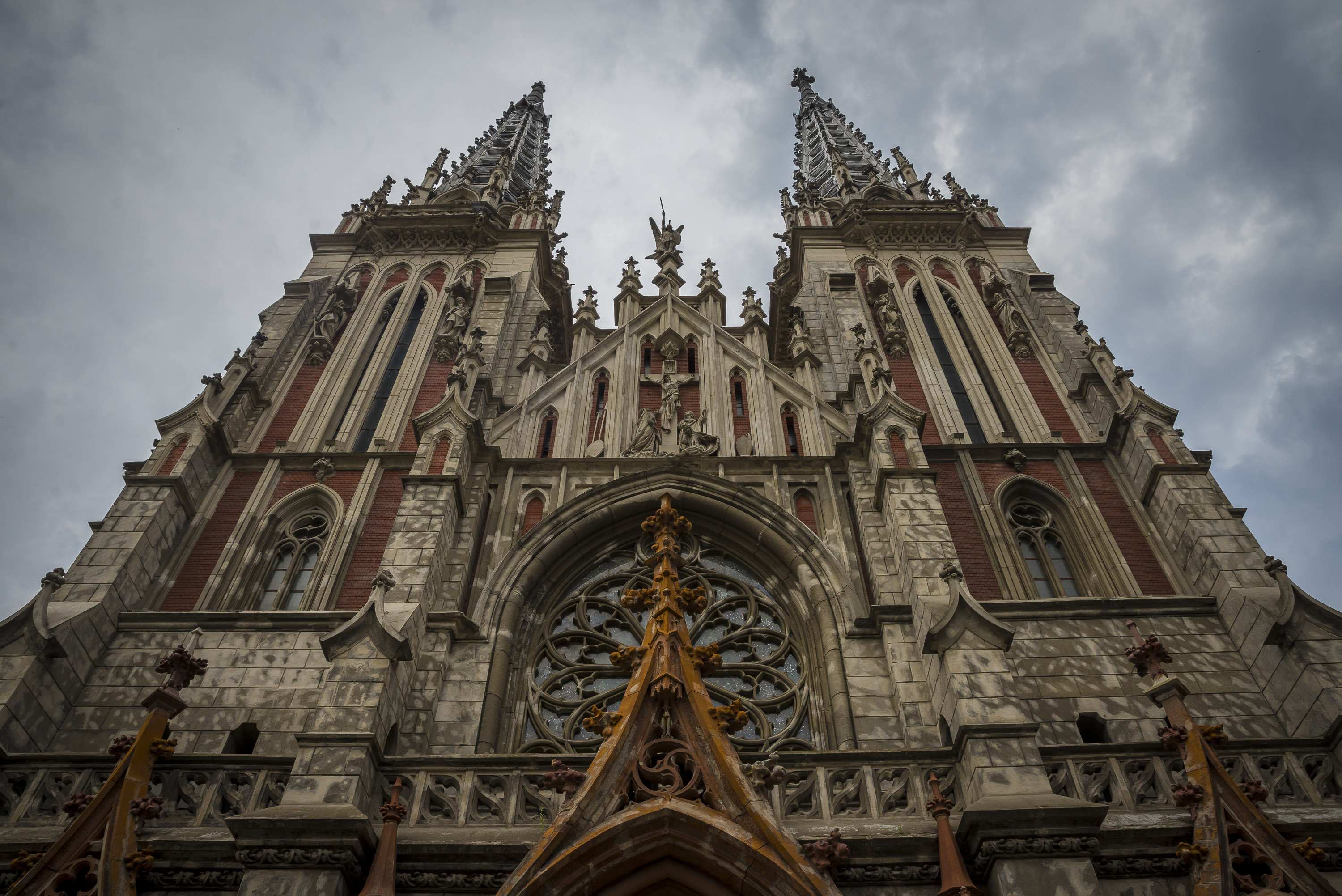 Костьол св. Миколая, Київ, Червоноармійська вул., 77